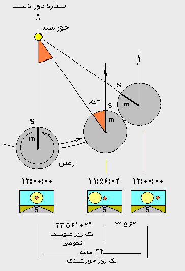 زمان نجومی در برابر زمان خورشیدی